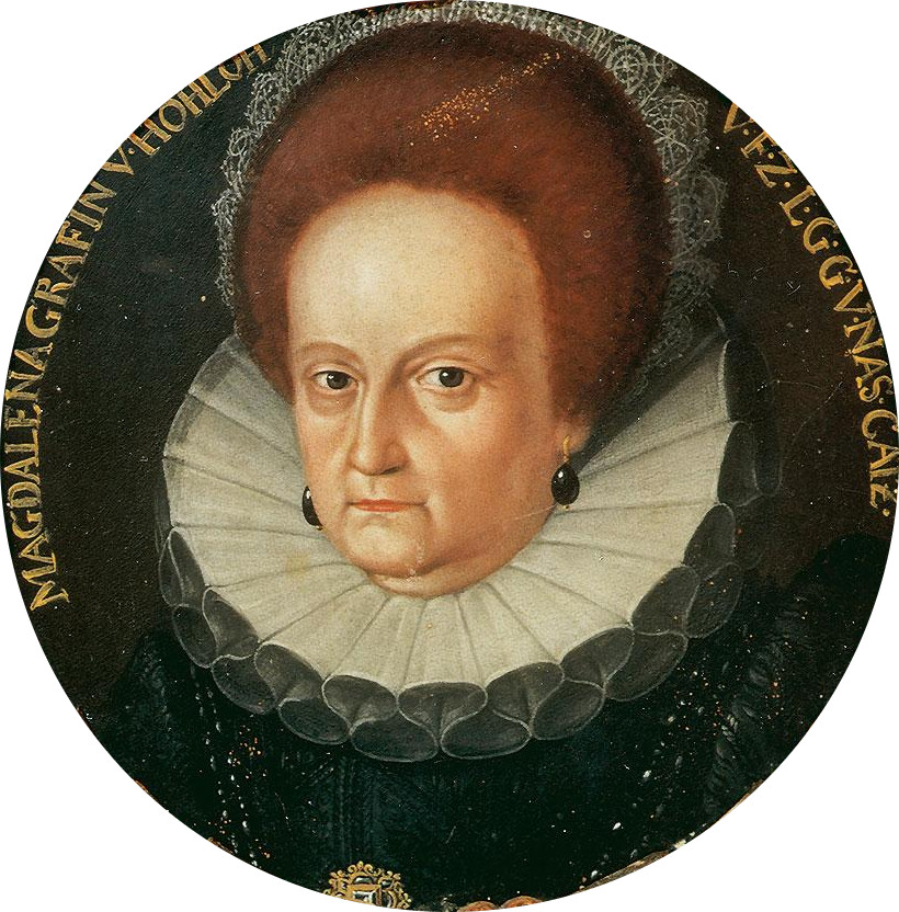 Gräfin Magdalena (1547–1633) entstammte dem einflussreichen Adelsgeschlecht der Grafen von Nassau-Katzenelnbogen und heiratete 1567 Wolfgang II. von Hohenlohe